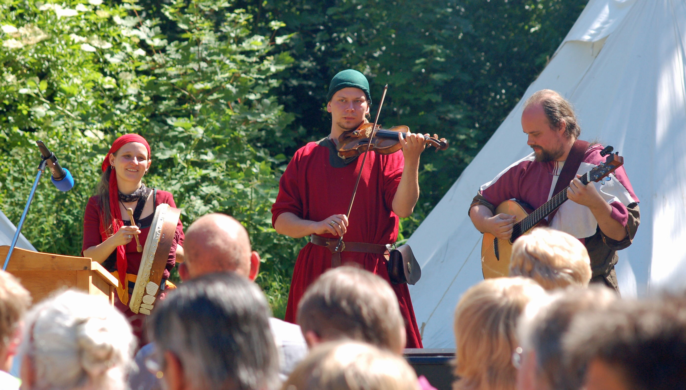 Die Celtic/Folkband Schattenweber beim mittelalterlichen Markttreyben zu Ueterst End auf dem historischen Burgplatz der ehemaligen Burg der Ritter von Barmstede auf dem Klostergelände.